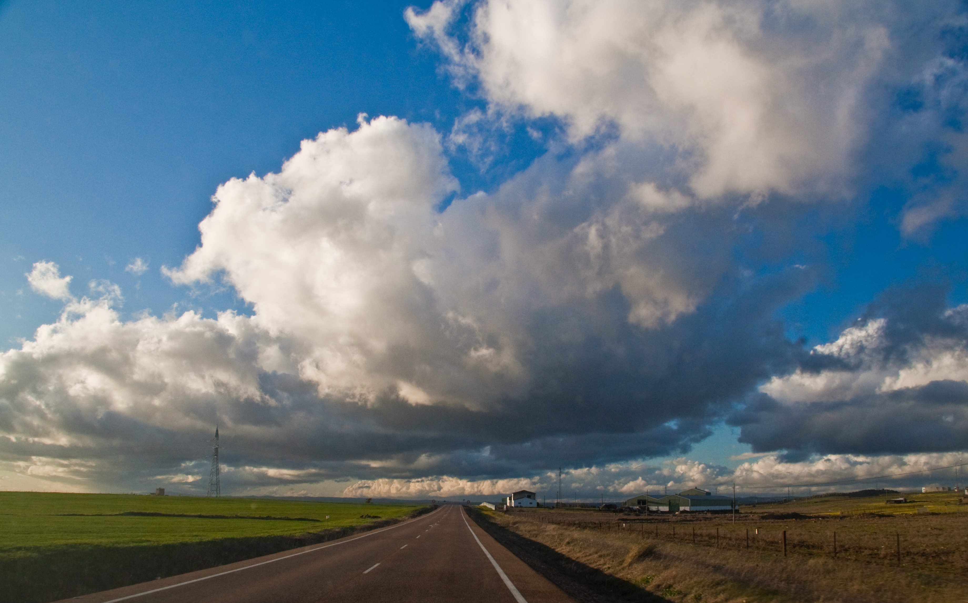 En la carretera Valverde de Leganés a Olivenza (Badajoz).